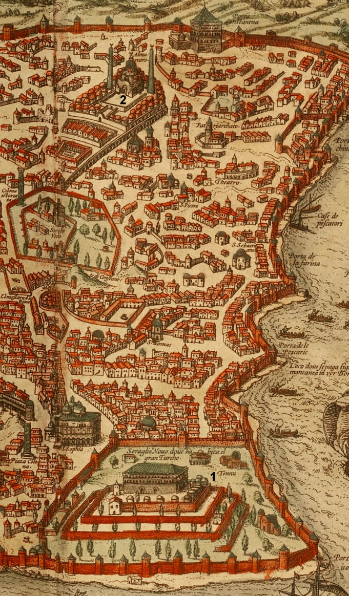 Konstantinopel, etwa 1479. Ausschnitt aus Giovanni Andrea Vavassores Karte von 1520 (nach verloren gegangenen Zeichnungen von etwa 1479), neu ediert 1575 in Civitates orbis terrarum von Georg Braun und Franz Hogenberg. Die beiden sich ergänzenden imperialen Gebäudekomplexe in Mehmeds Konzept des erneuerten Konstantinopels (Kostantiniyye) sind: der profane Komplex des „Neuen Serails“ der religiöse Komplex um die „Neue Moschee“ (Fathi Camii)